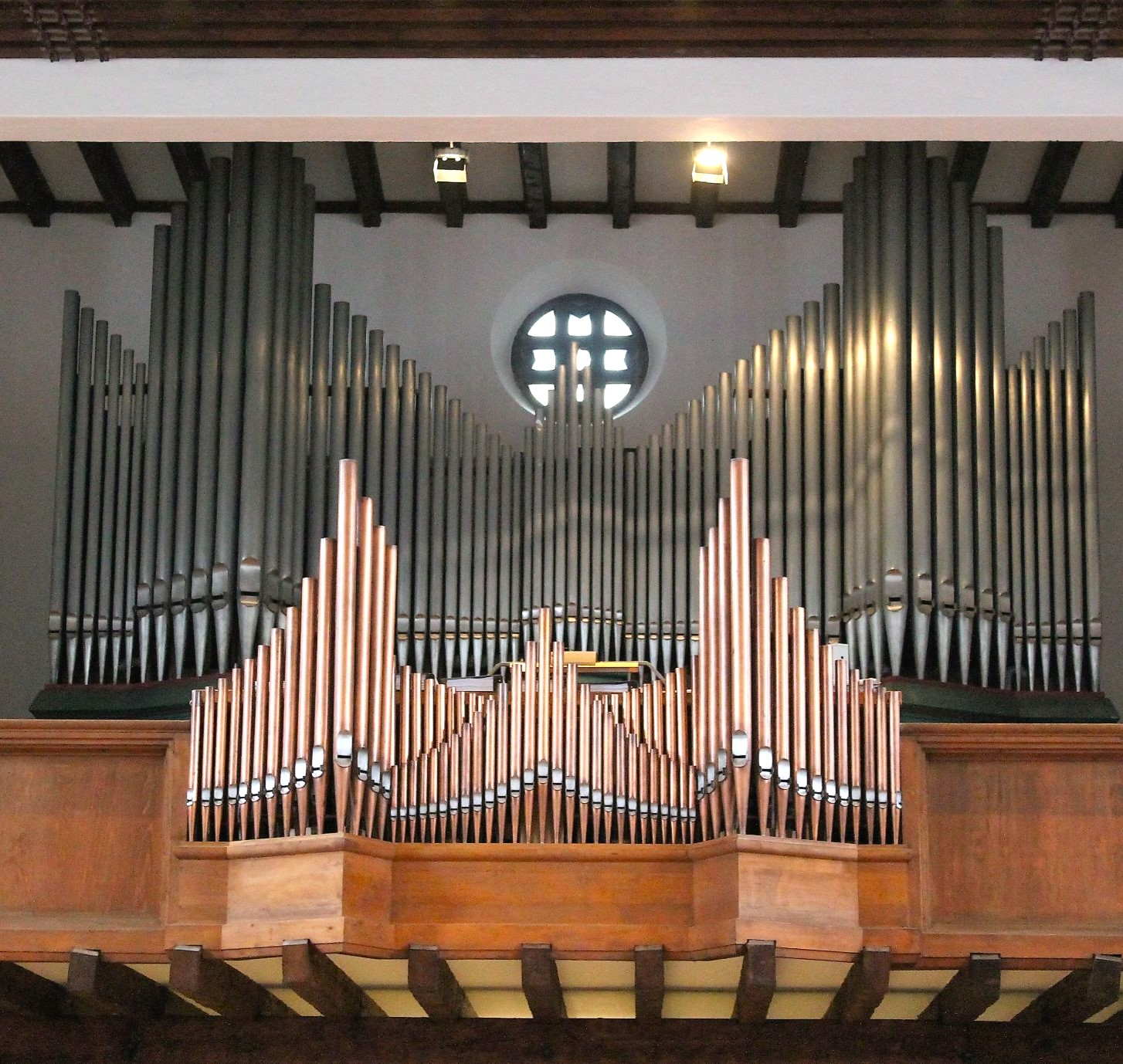 Orgel der evang.-luth. Dreieinigkeitskirche in München-Bogenhausen